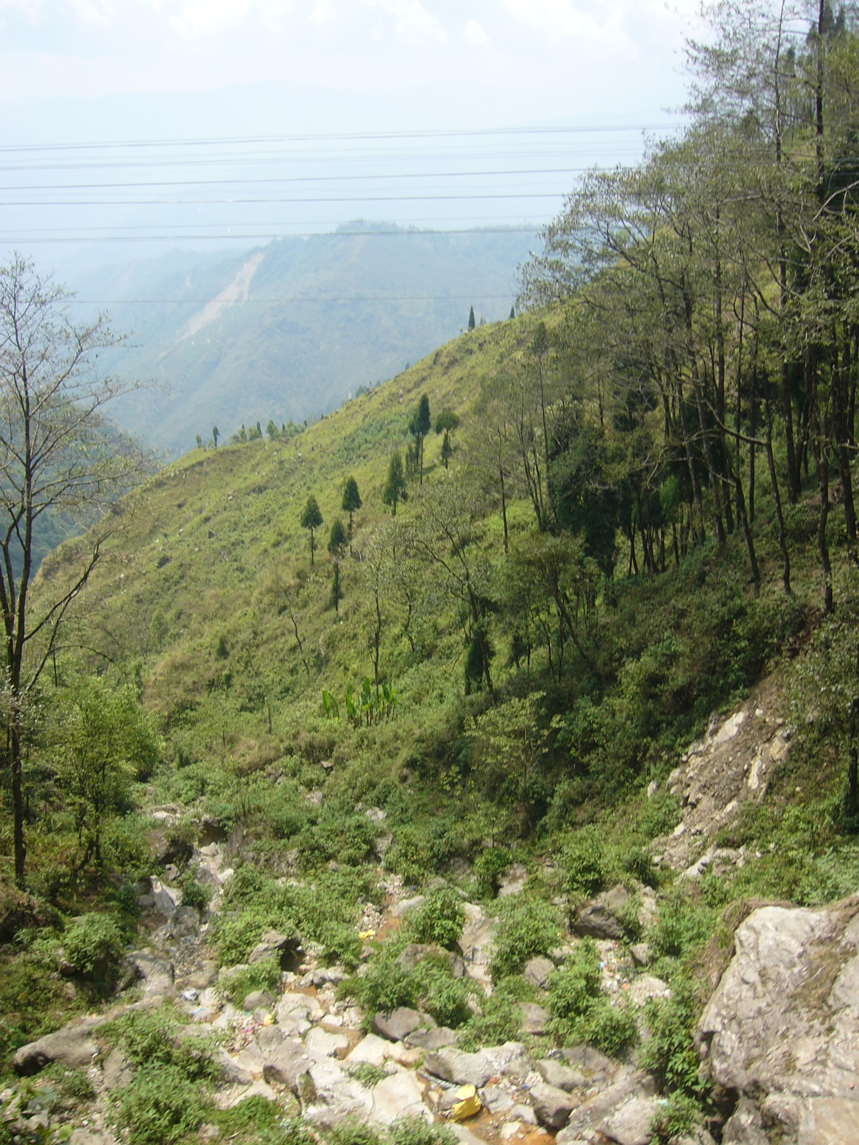 Darjeeling West Bengal India